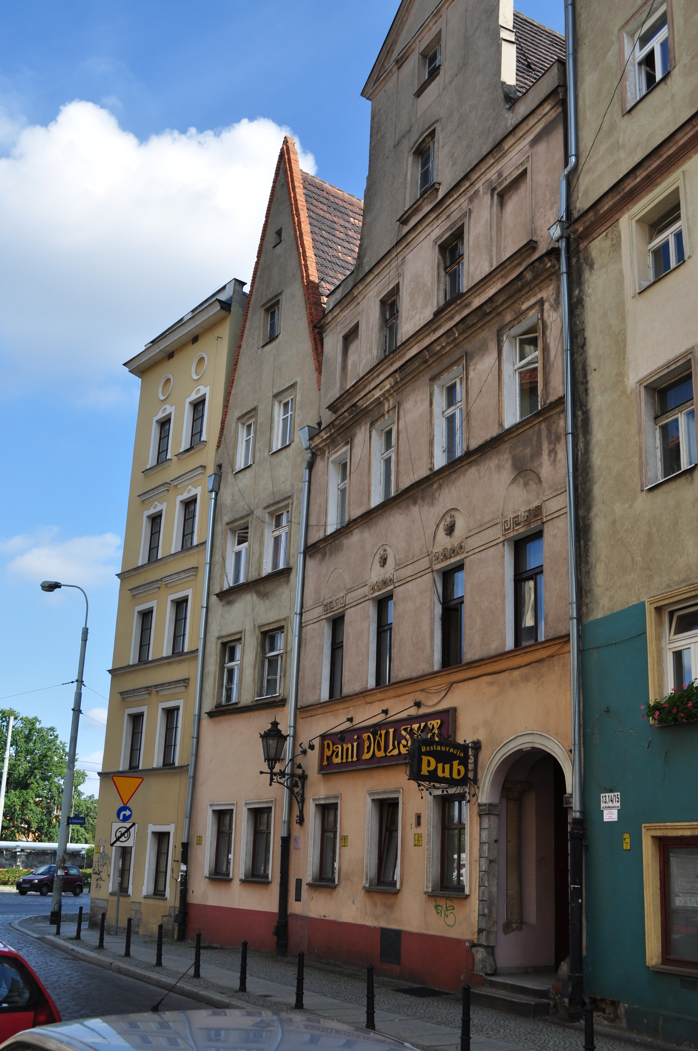 Kamienica Kiełbaśnicza 15, Miasto Wrocław - Stare Miasto. Drugi budynek od lewej.